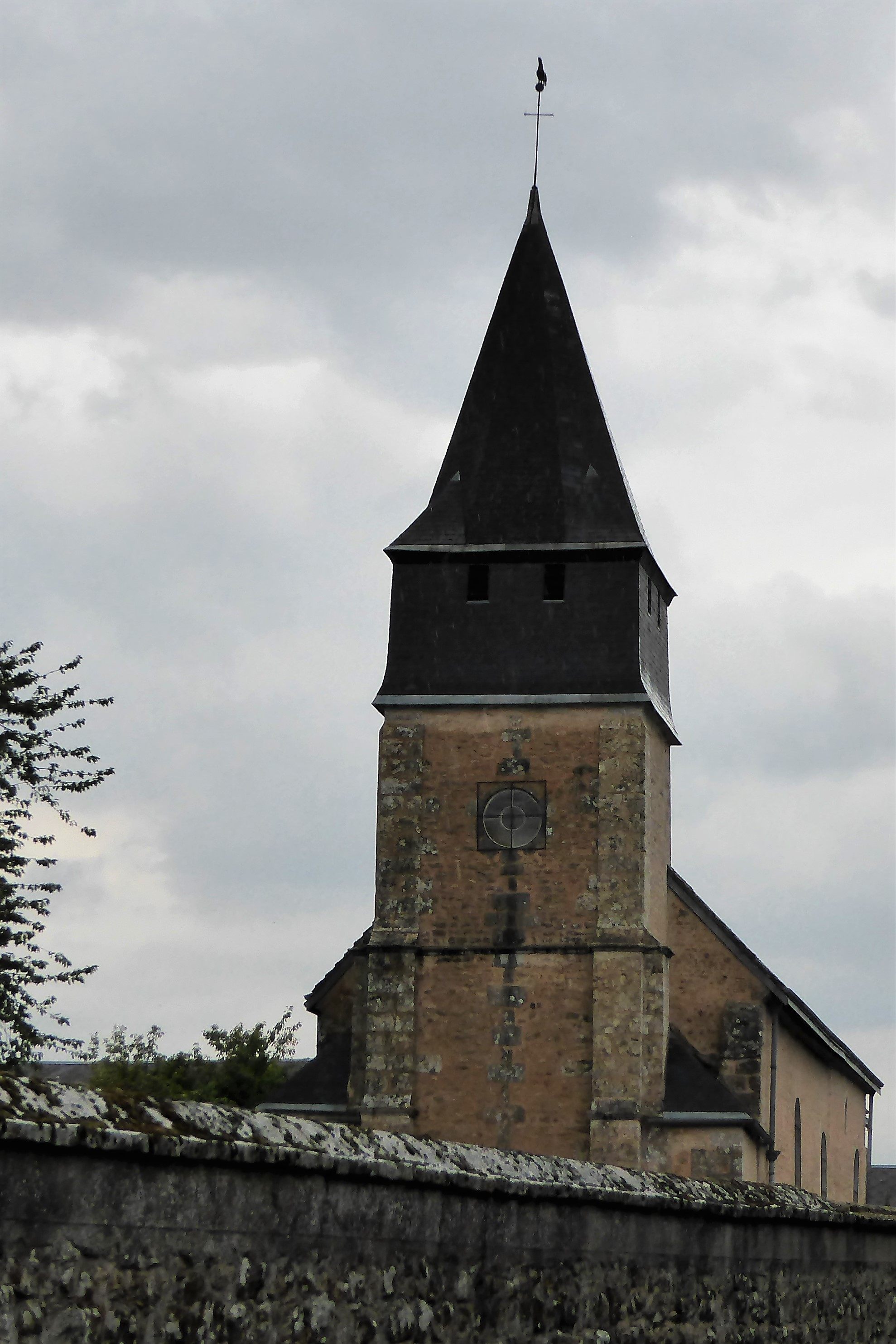 église Saint-Jacques, Allonnes, Eure-et-Loir (France).